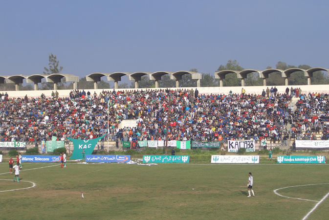 Photo prise lors du match KAC - USK, et dont l'auteur (un ami à moi) a décidé de la mettre sous licence libre